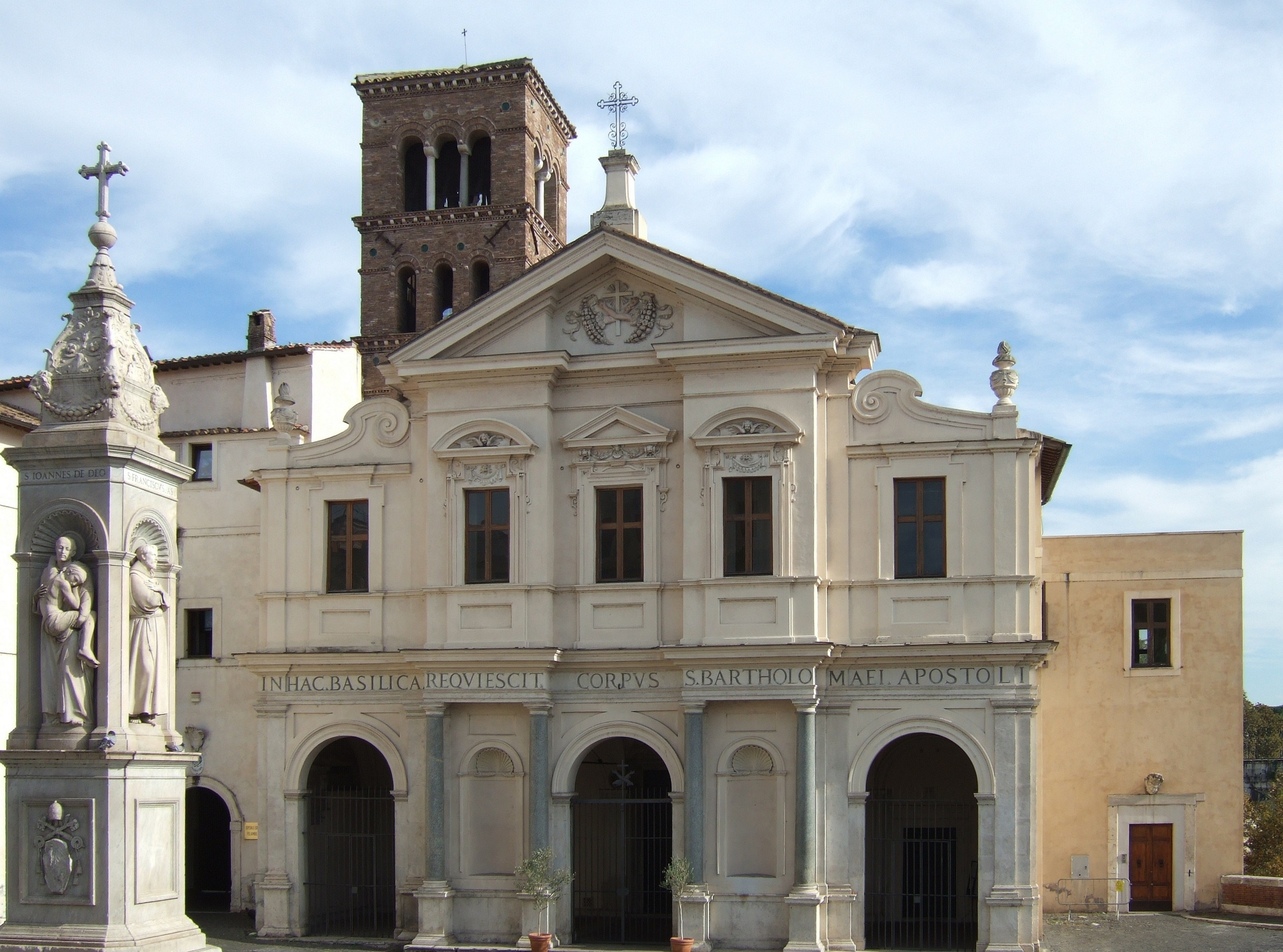 San Bartolomeo all’Isola auf der Tiberinsel in Rom